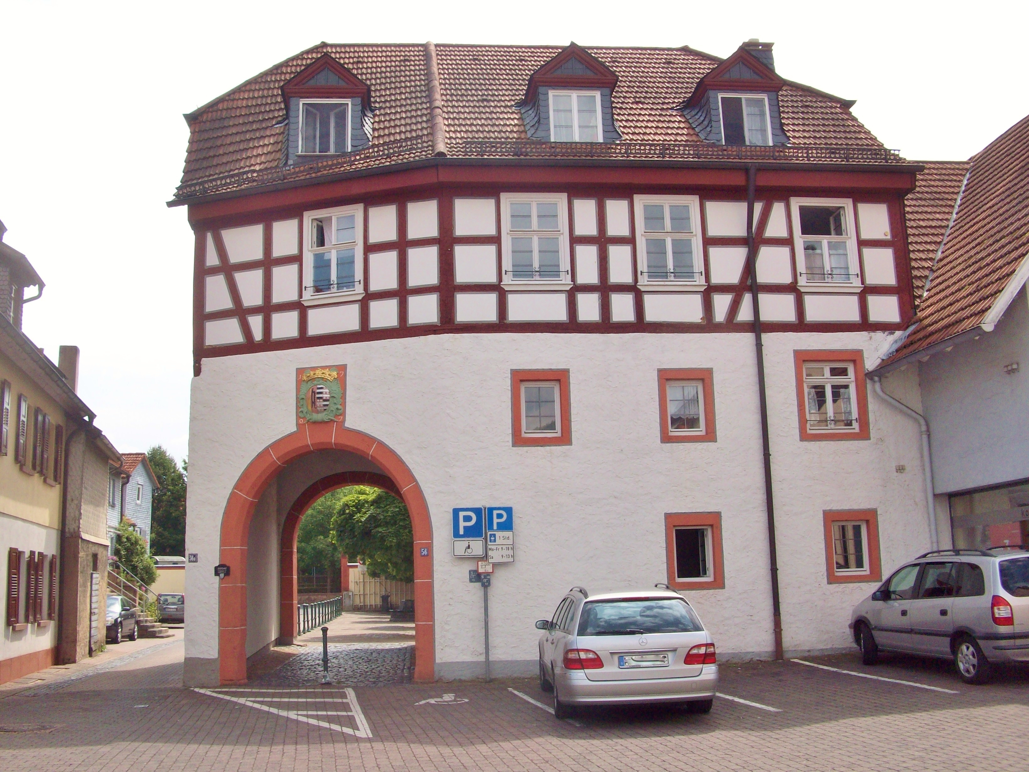 Blick auf das Torhaus. Eingang zum Schleifrashof